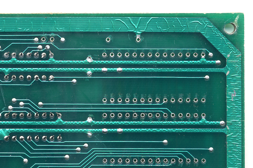 はんだ剥離法におけるパターン形成の後、はんだを剥離しないままソルダーレジストを塗布した方法